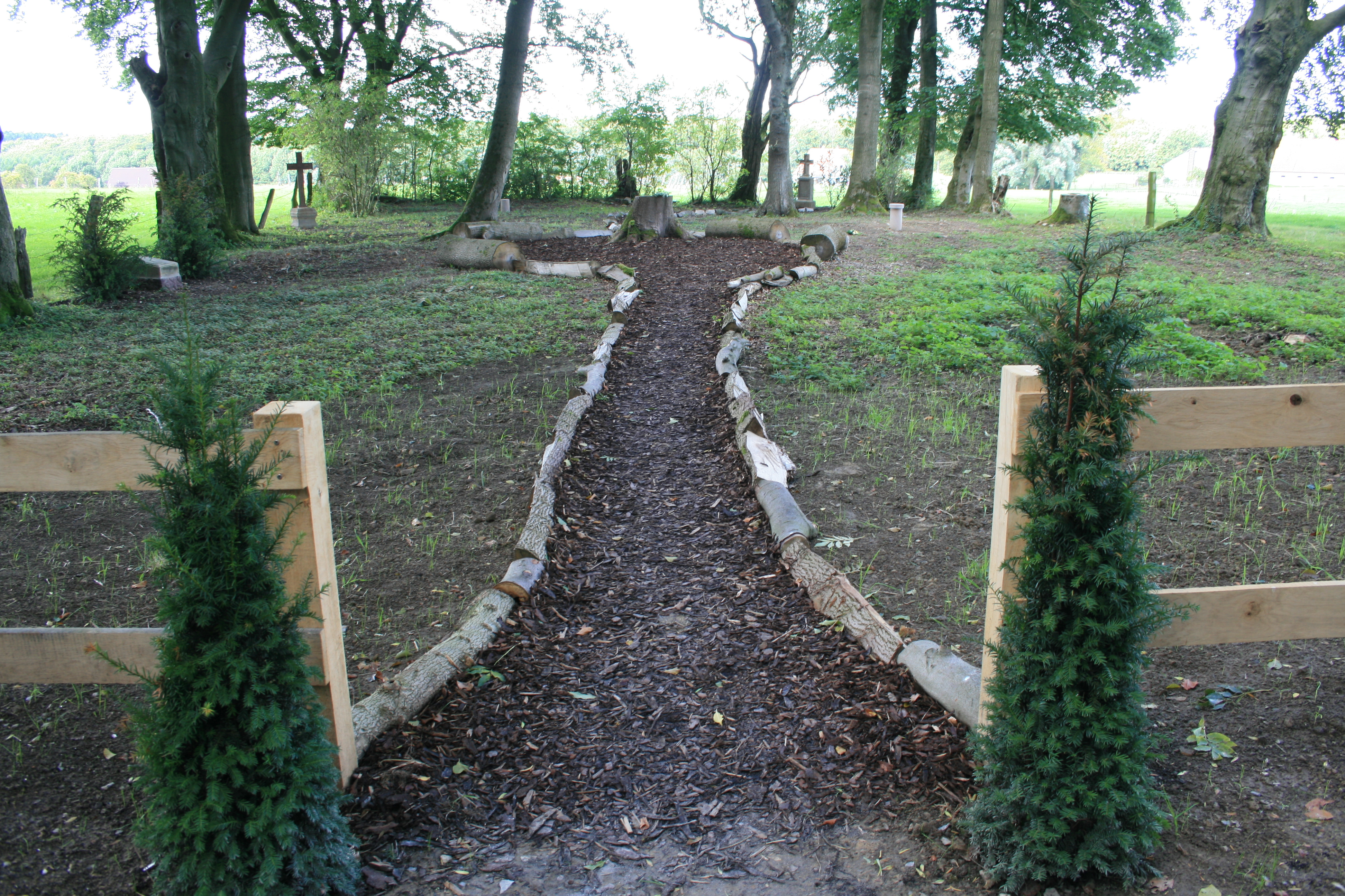 Evangelischer Waldfriedhof Altenböddeken, Wewelsburg, Büren, Nordrhein-Westfalen, Deutschland